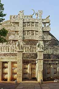 photo du torana nord de Sânchî, Madhya Pradesh, Inde